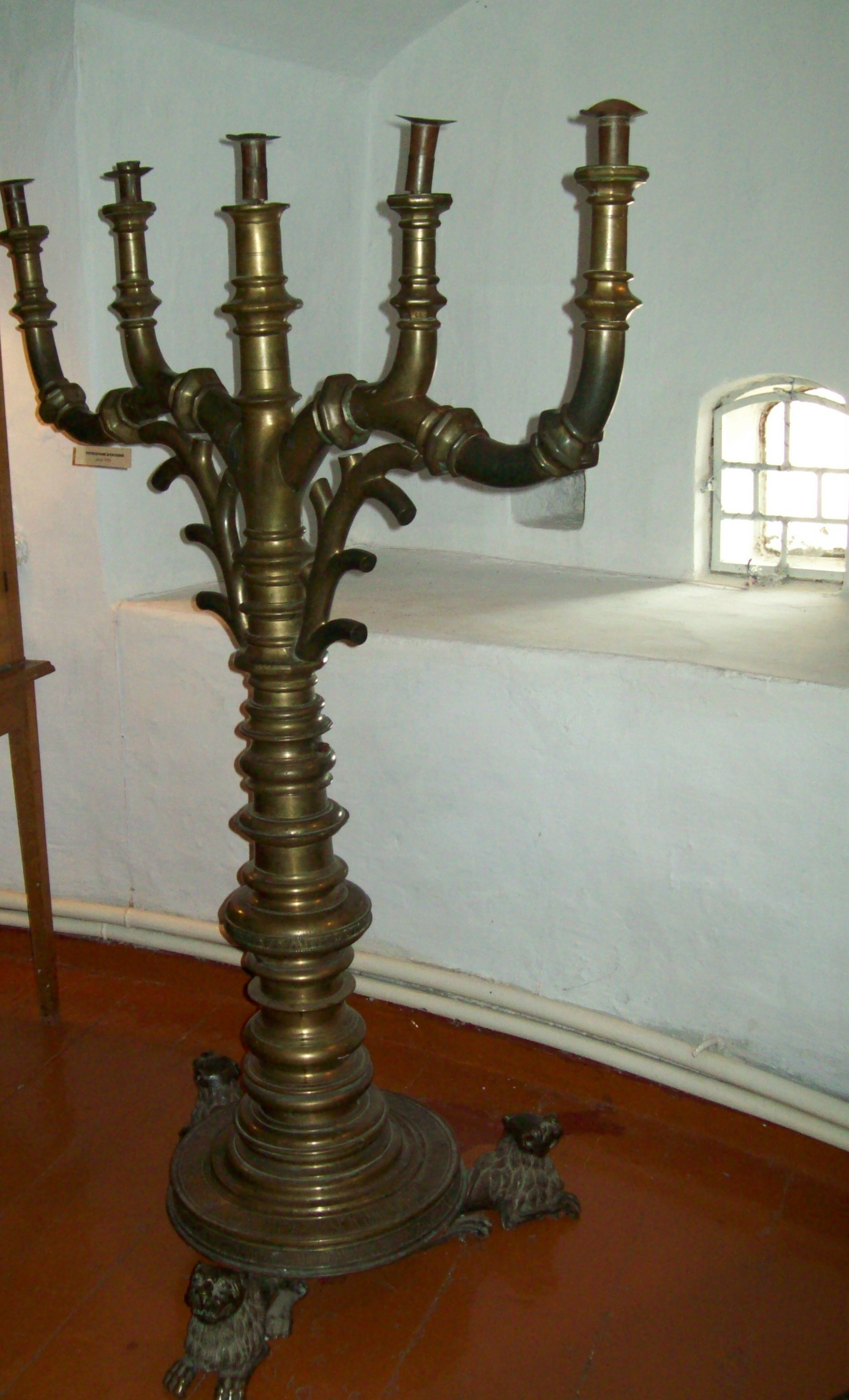 Знято фотоапаратом Кодак